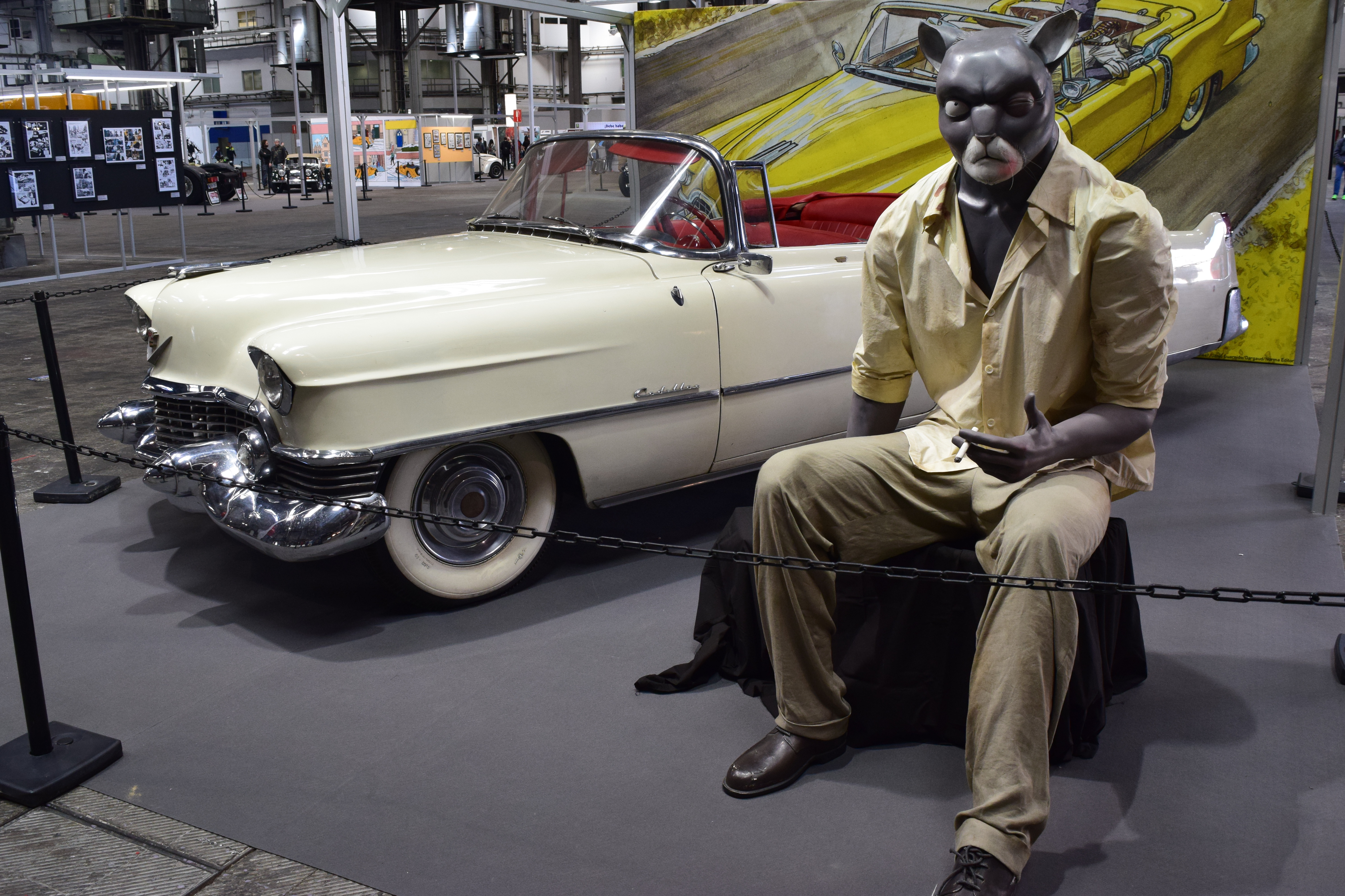 Cadillac Eldorado Brougham al darrere del detectiu John Blacksad. El conjunt pertany a l'exposició Vinyetes sobre rodes del 34è Saló Internacional del Còmic de Barcelona (2016).